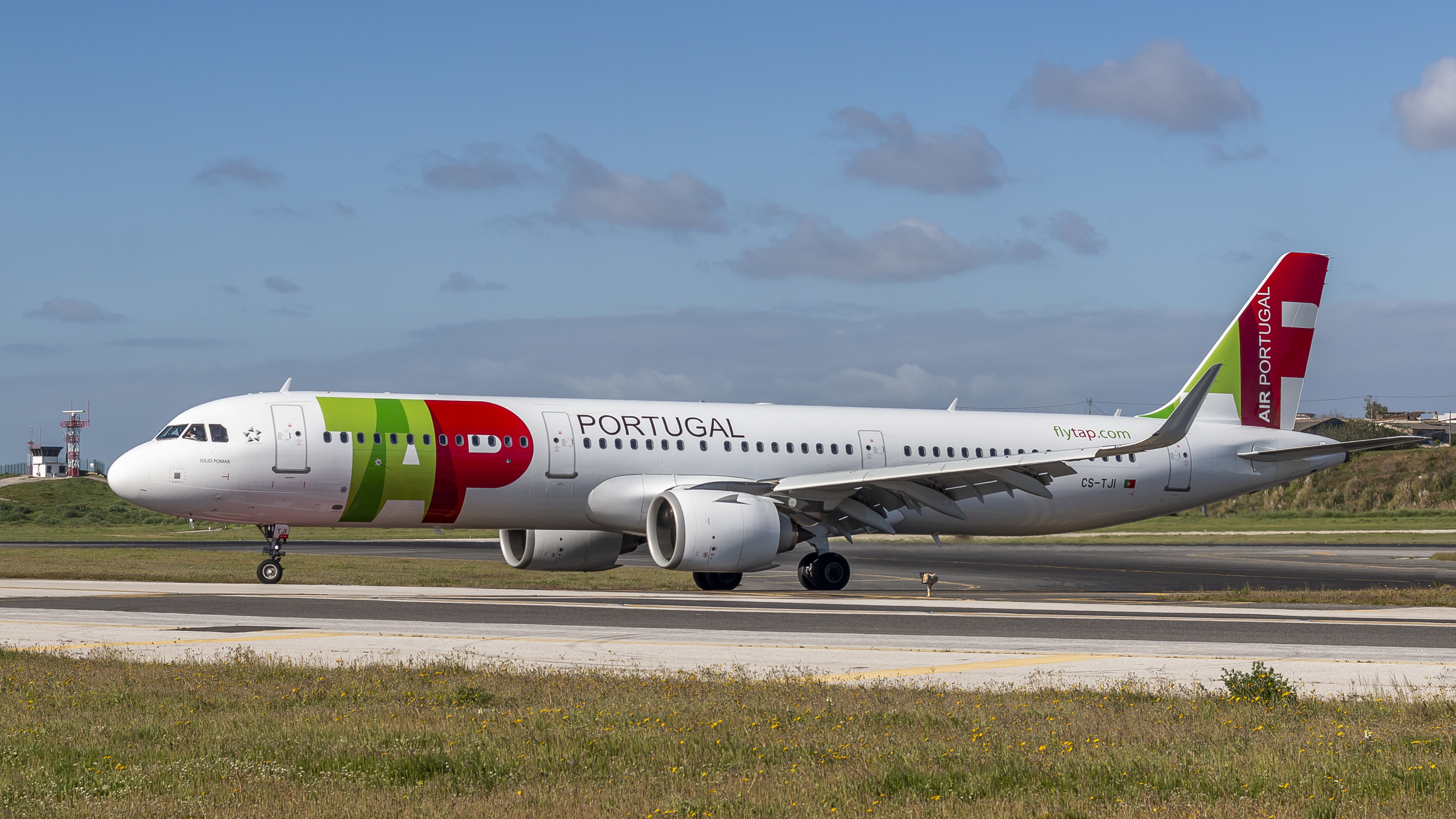 Lisbon, Portugal